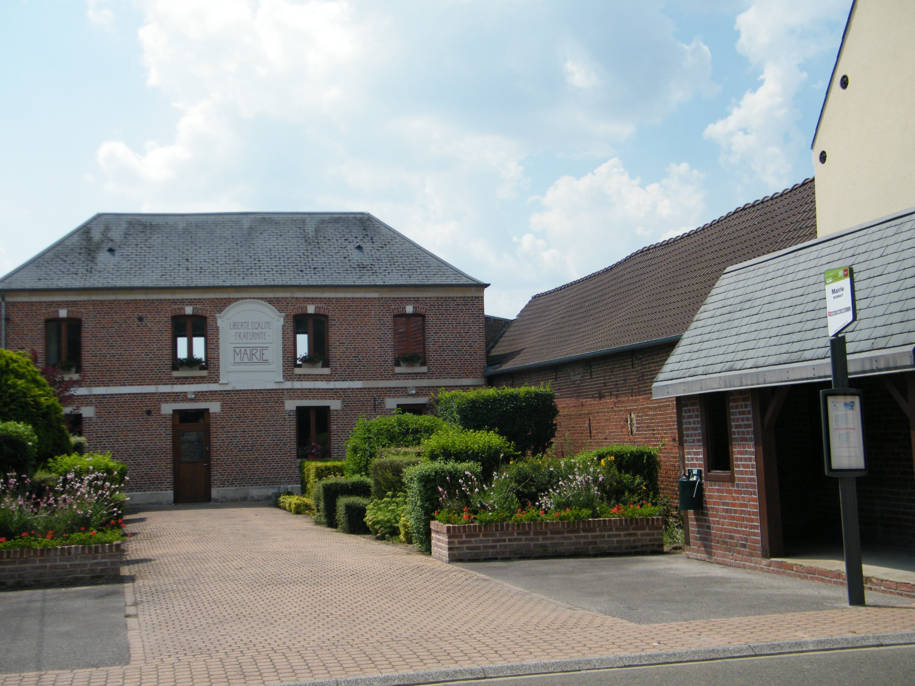 Mairie de Bonnay (Somme), Fr.